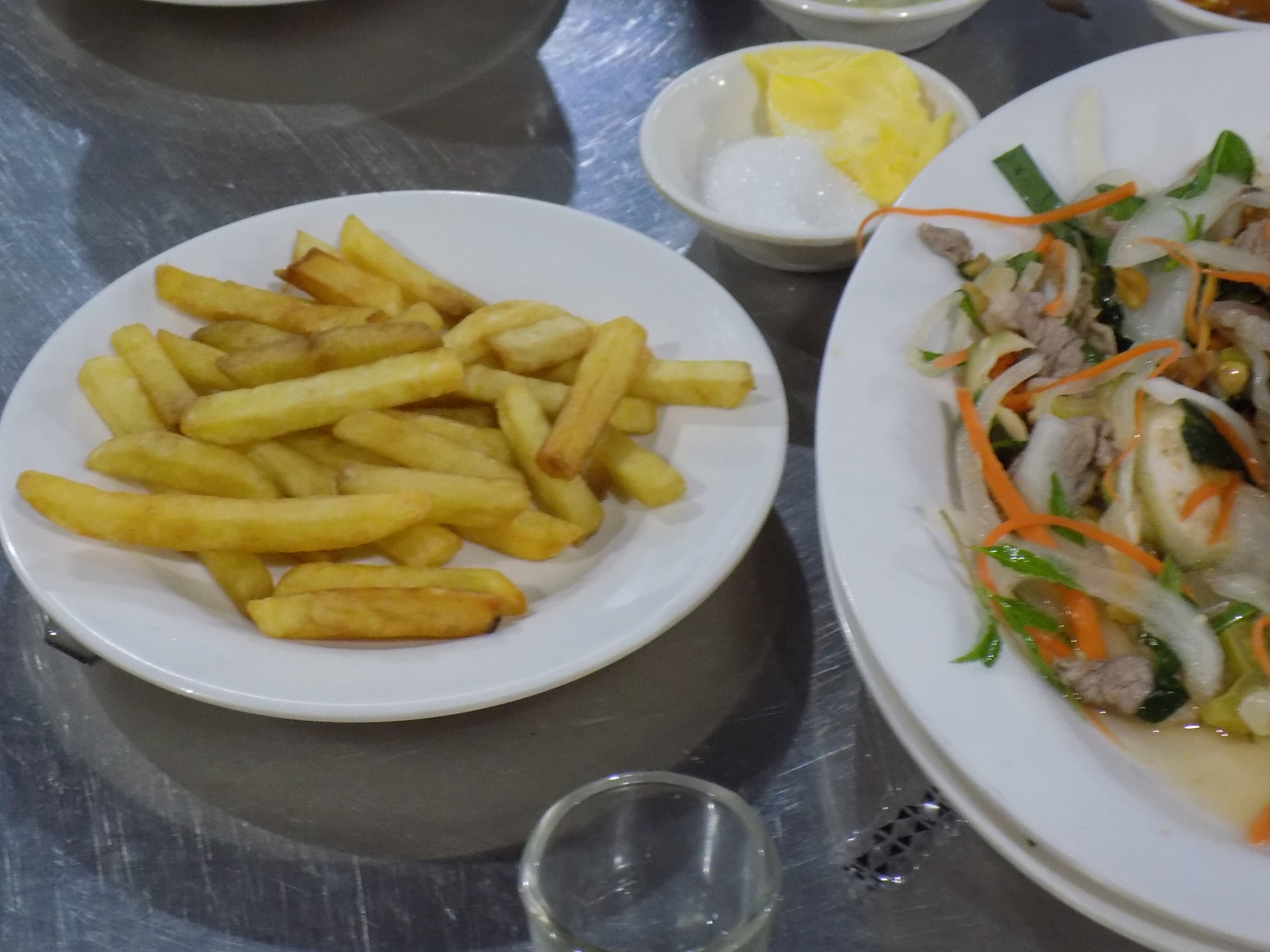 Frites accompagnées de beurre et sucre servi dans un restaurant à Ho Chi Minh Ville au Viet Nam en décembre 2018.